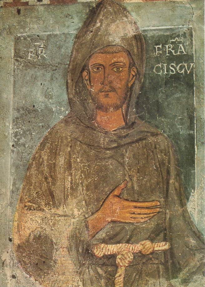 S.Francesco (Subiaco, Sacro Speco)